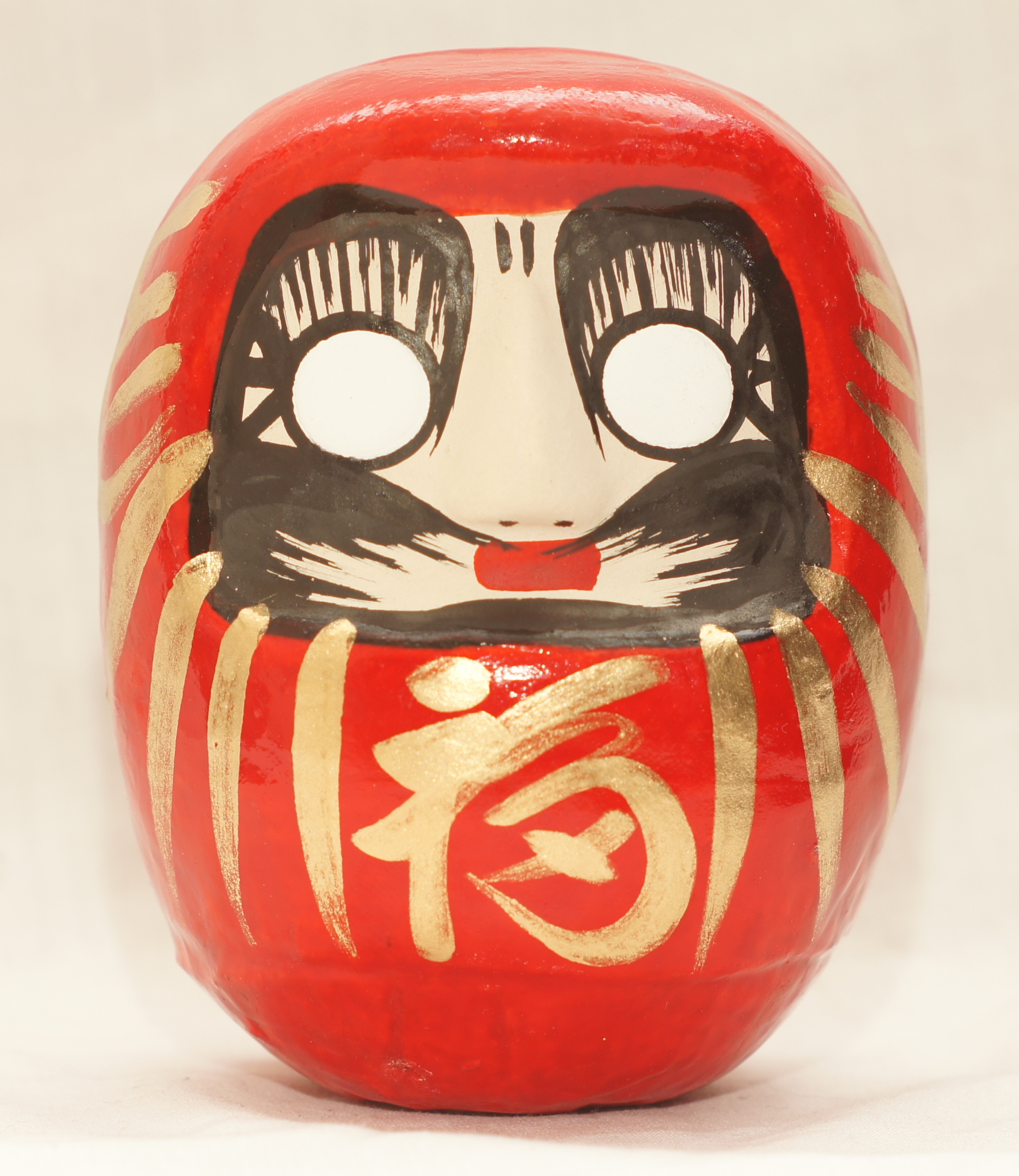 神明市（広島県三原市）で販売される「玉島だるま」（岡山県産）